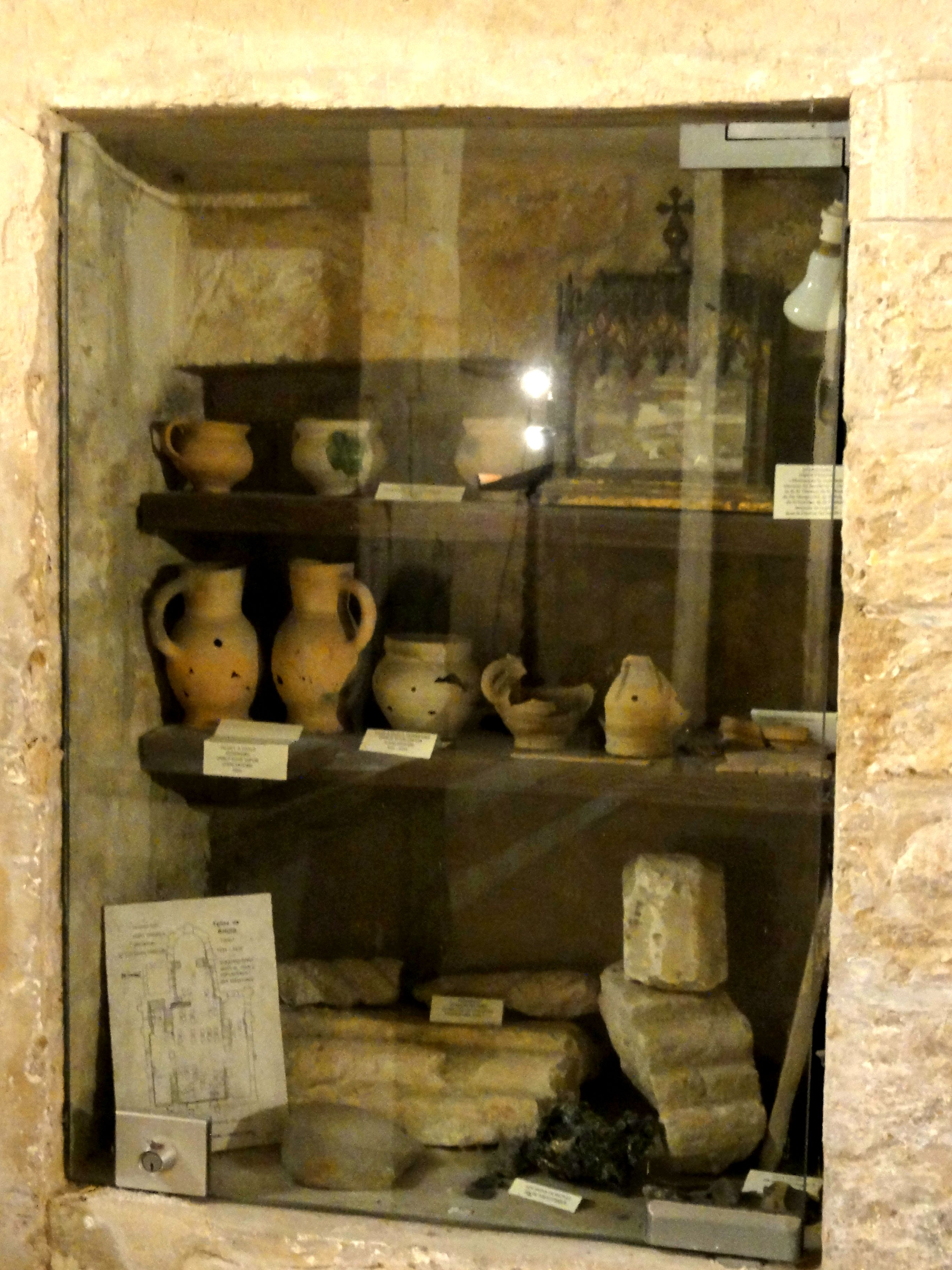 Chapelle sud, vitrine - mobilier des fouilles archéologiques.